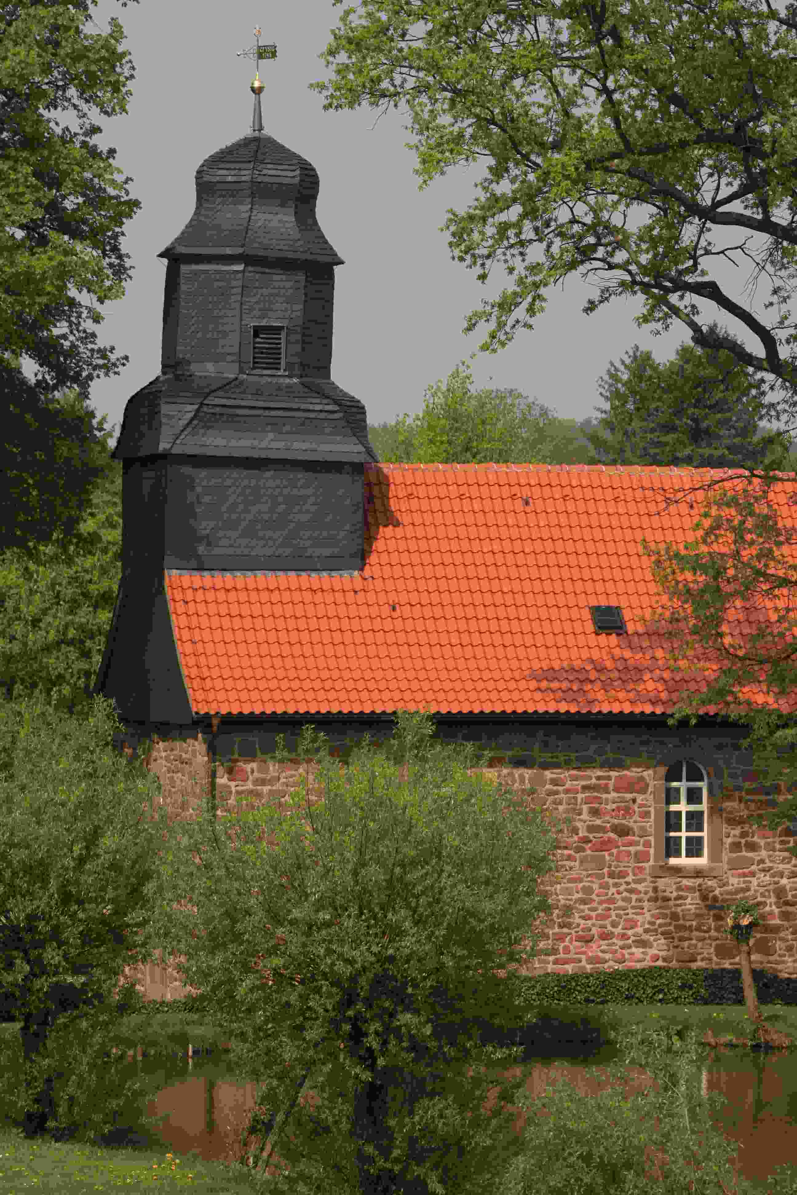 Dorfkirche Lichtenhagen